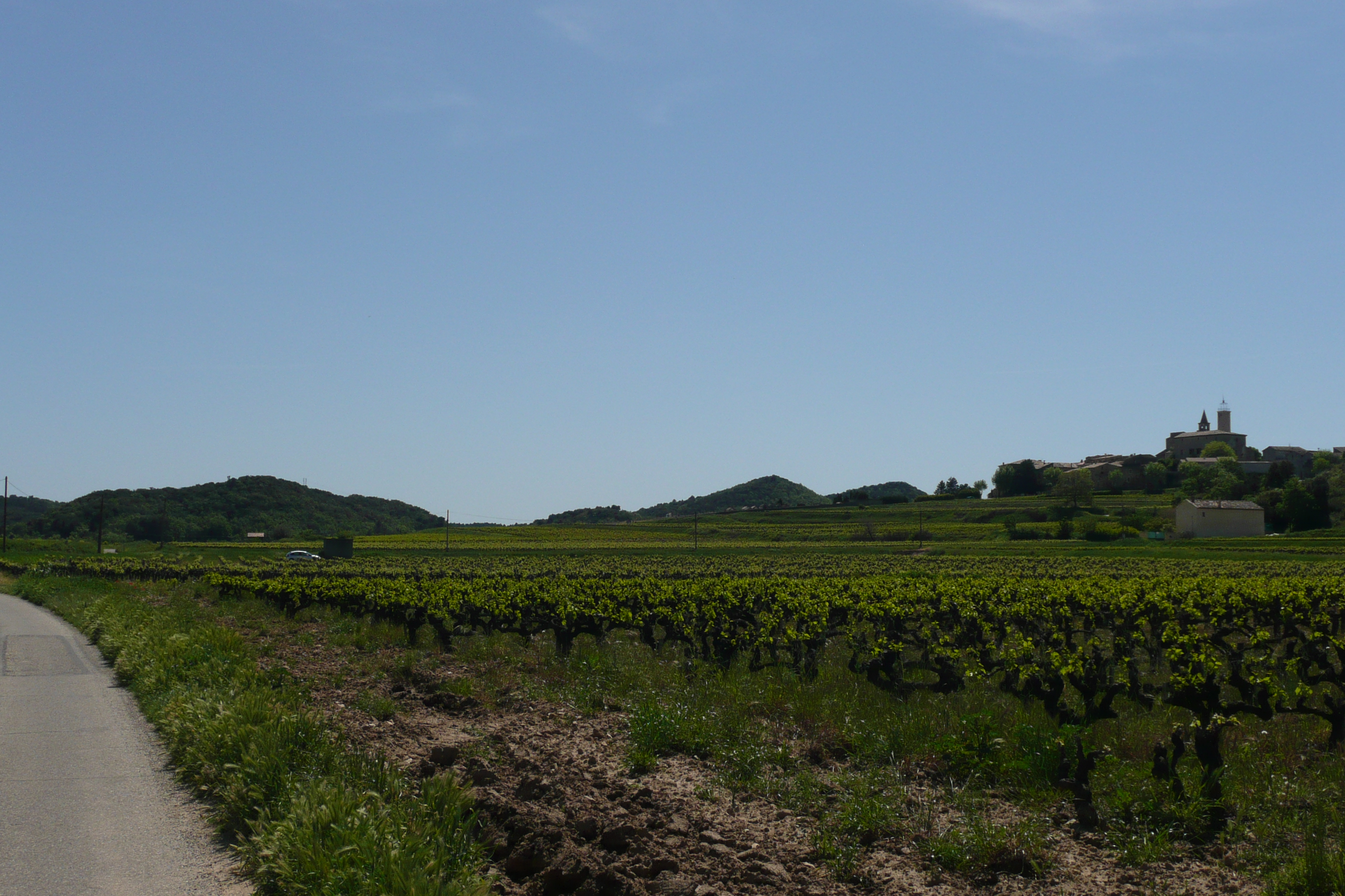 Paysage à Saint-Alexandre (Gard).